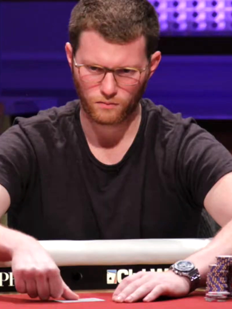 Nick Petrangelo beim WPT Alpha8 Las Vegas